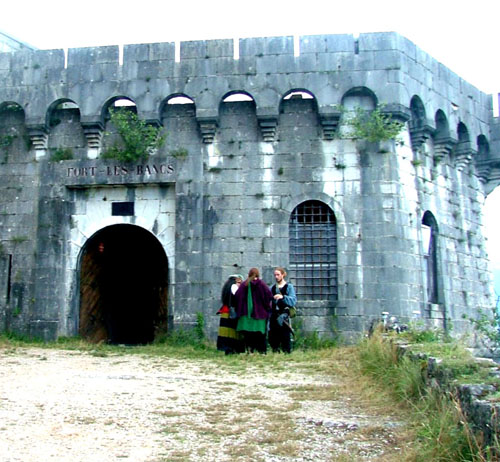 Fort les Bancs dans l'Ain